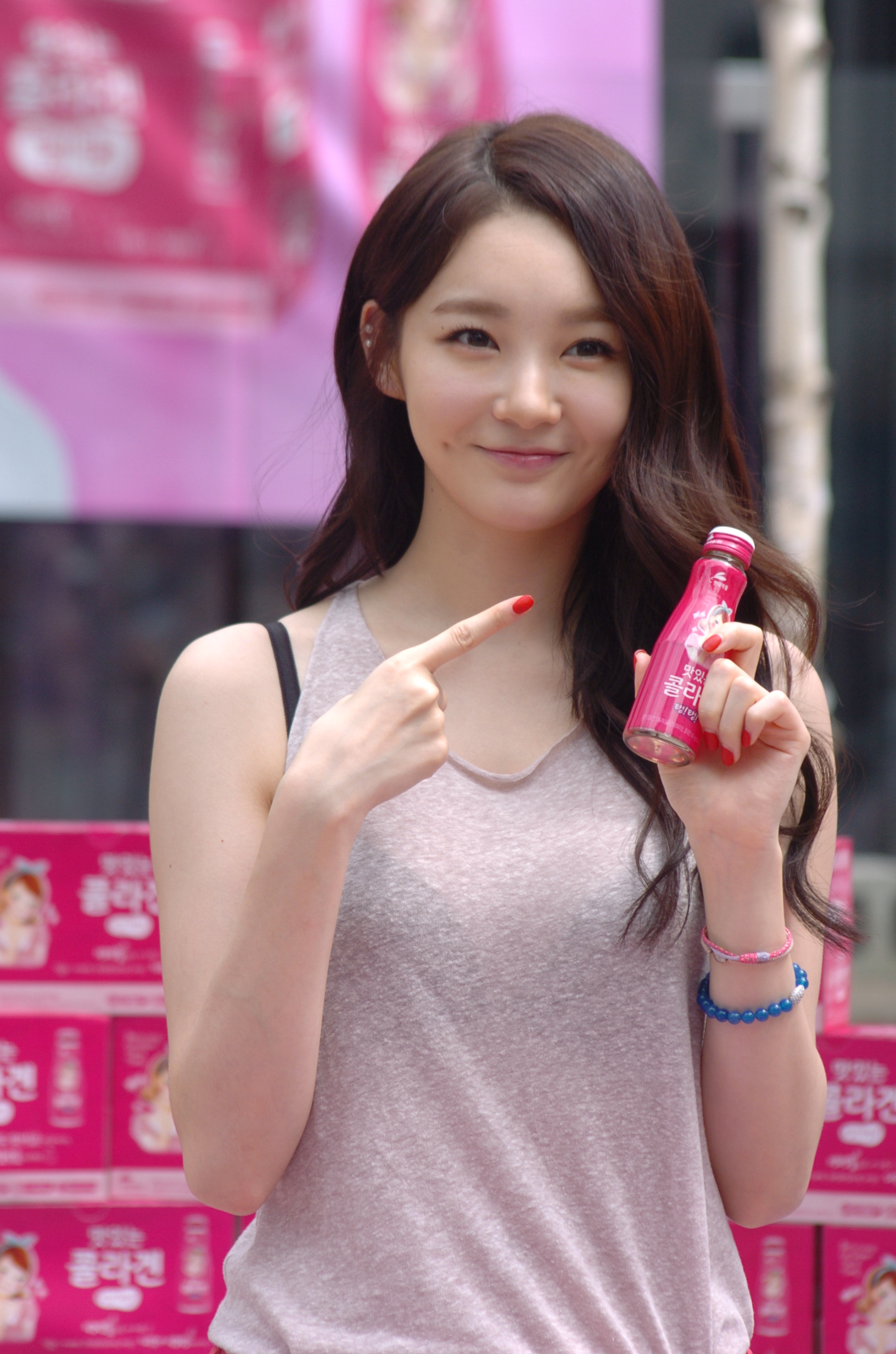 2012년 7월 27일 현대약품의 콜라겐 음료 ‘맛있는 콜라겐 탱탱’ 제품 샘플링과 쉐프 도전 행사(탱탱얼굴! 강민경 Chef 변신)에 참석한 다비치의 강민경.